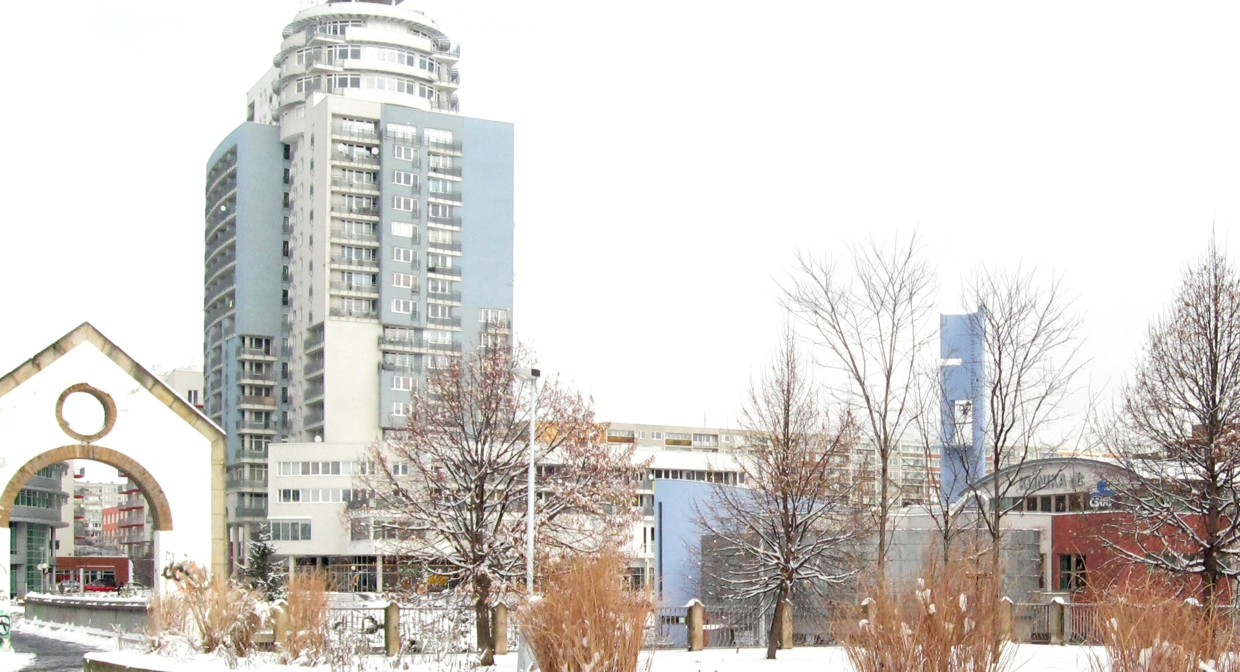 Modrá a bílá na Slunečním náměstí